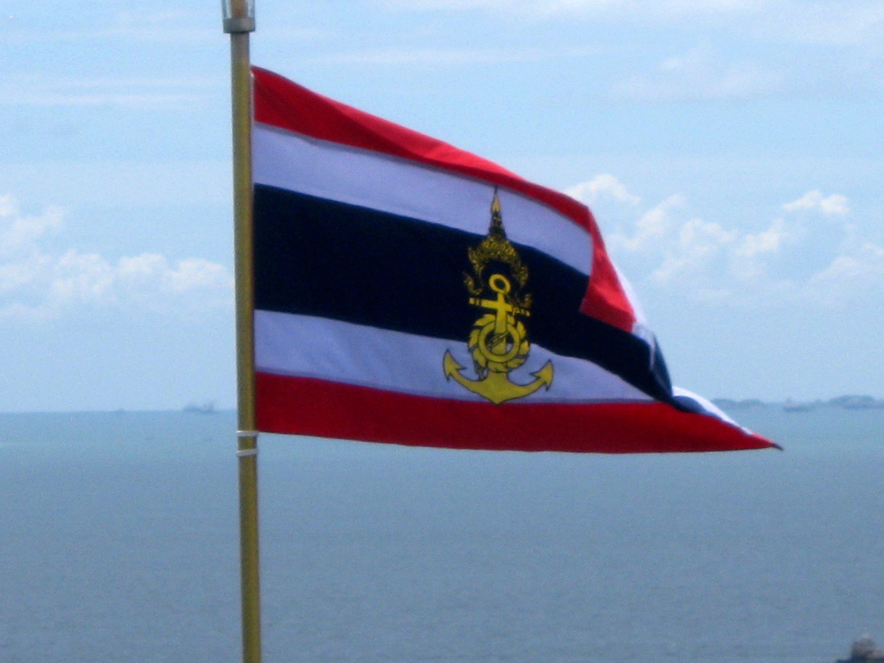 Гюйс ВМС Таиланда на флагштоке на холме Пратамнак